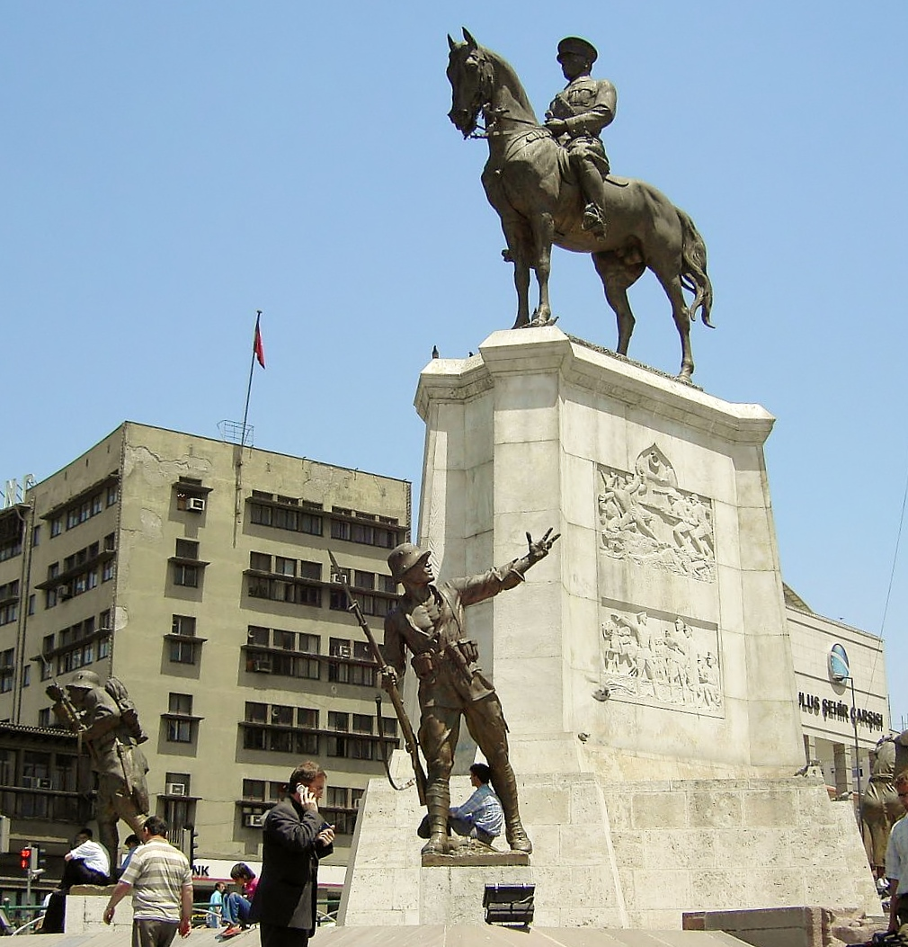 Ankara Ulus Meydanı'ndaki Zafer Anıtı